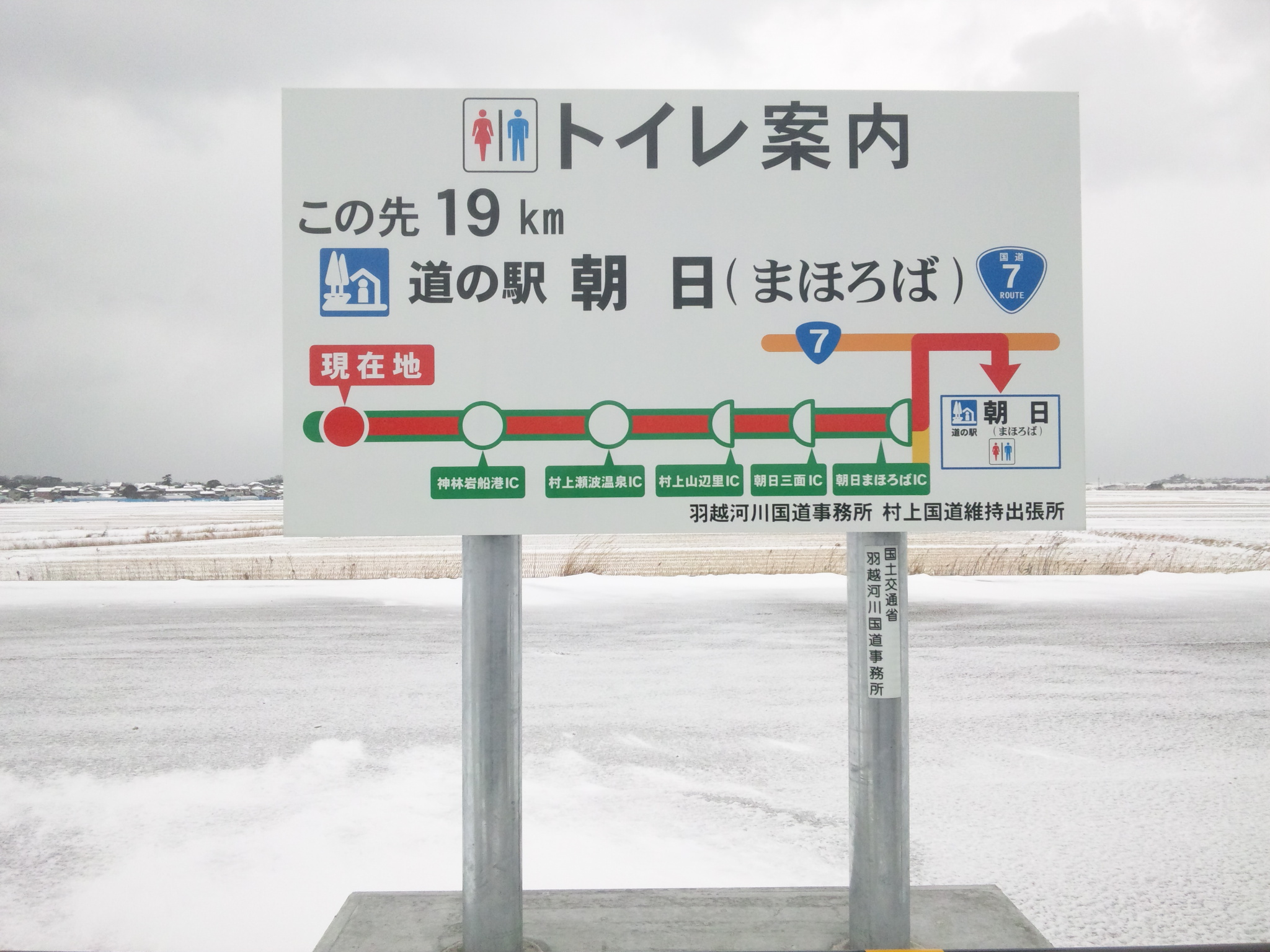 日本海東北自動車道の荒川PA（神林岩船港IC方面）にある看板